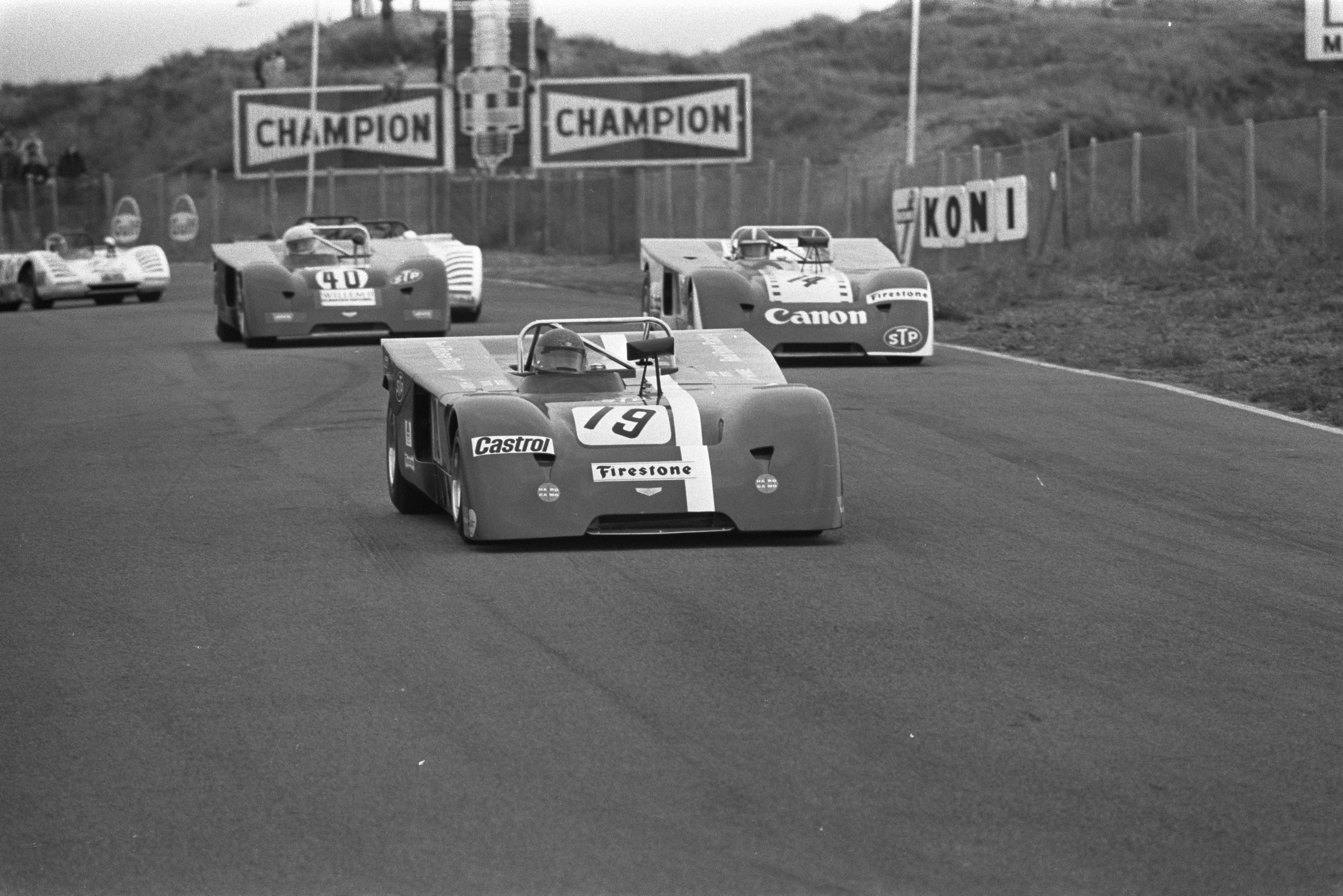 Collectie / Archief : Fotocollectie Anefo Reportage / Serie : [ onbekend ] Beschrijving : Autoraces "Trophy of the Dunes" , Zandvoort, nr. 4A Liane Engeman (?) kop Datum : 26 september 1971 Locatie : Noord-Holland, Zandvoort Trefwoorden : AUTORACES Persoonsnaam : Engeman, Liane Fotograaf : Evers, Joost / Anefo Auteursrechthebbende : Nationaal Archief Materiaalsoort : Negatief (zwart/wit) Nummer archiefinventaris : bekijk toegang 2.24.01.05 Bestanddeelnummer : 924-9748